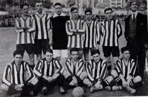 Equip del RCD Espanyol guanyador del Campionat de Catalunya 1911-12